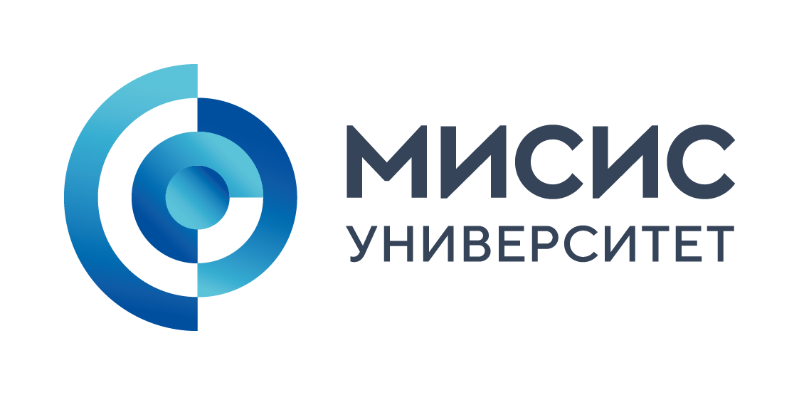 Официальный логотип НИТУ "МИСиС"